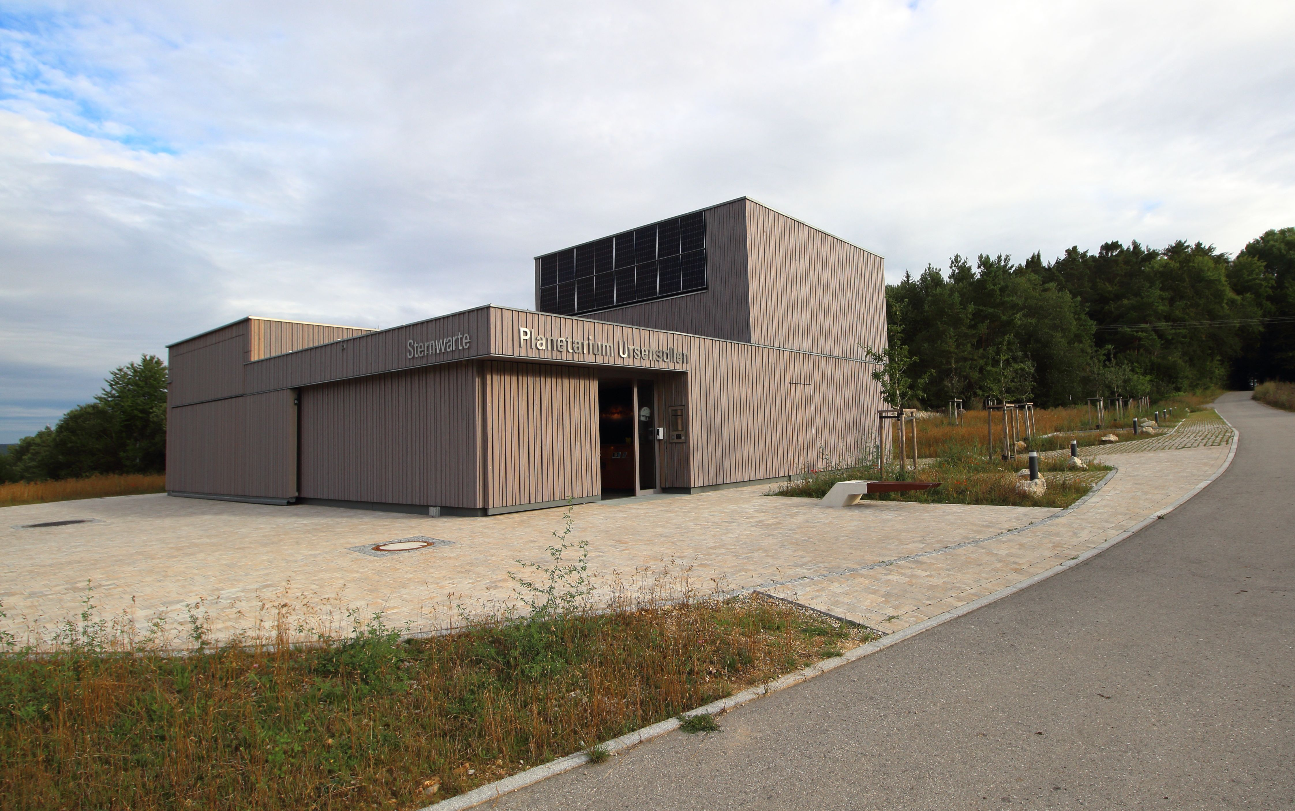 Aussenansicht Planetarium mit Sternwarte Ursensollen